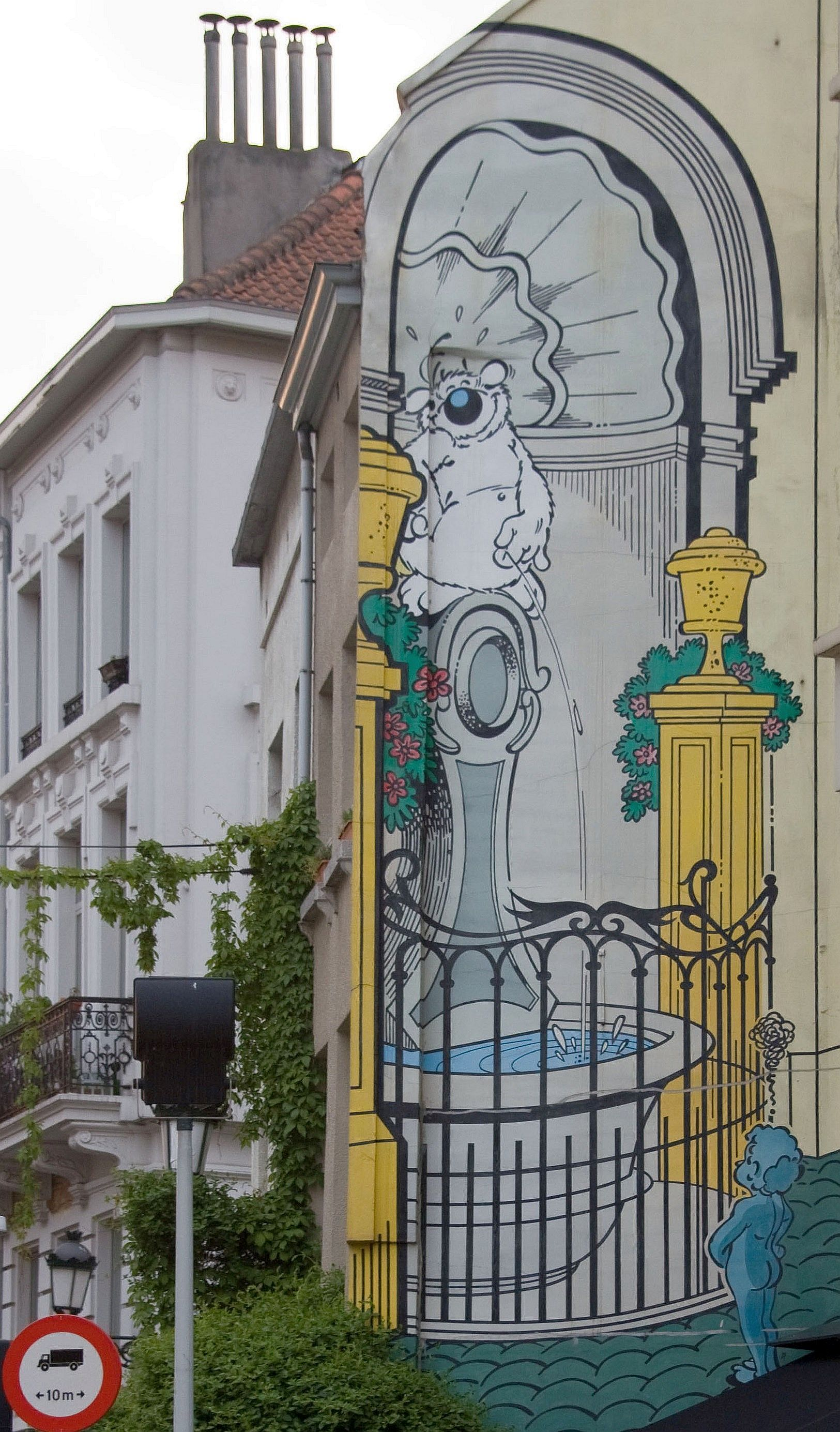 Fresque murale "Cubitus" (Parcours BD), 109 rue des Flandres, à Bruxelles en mai 2010 / Brussels / Belgique